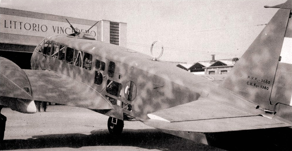 aereo da ricognizione Caproni Ca.311, matricola MM. 11531, fotografato presso gli stabilimenti dell'Aeronautica Caproni di Vizzola Ticino, provincia di Varese. Categoria:Immagini di aeroplani